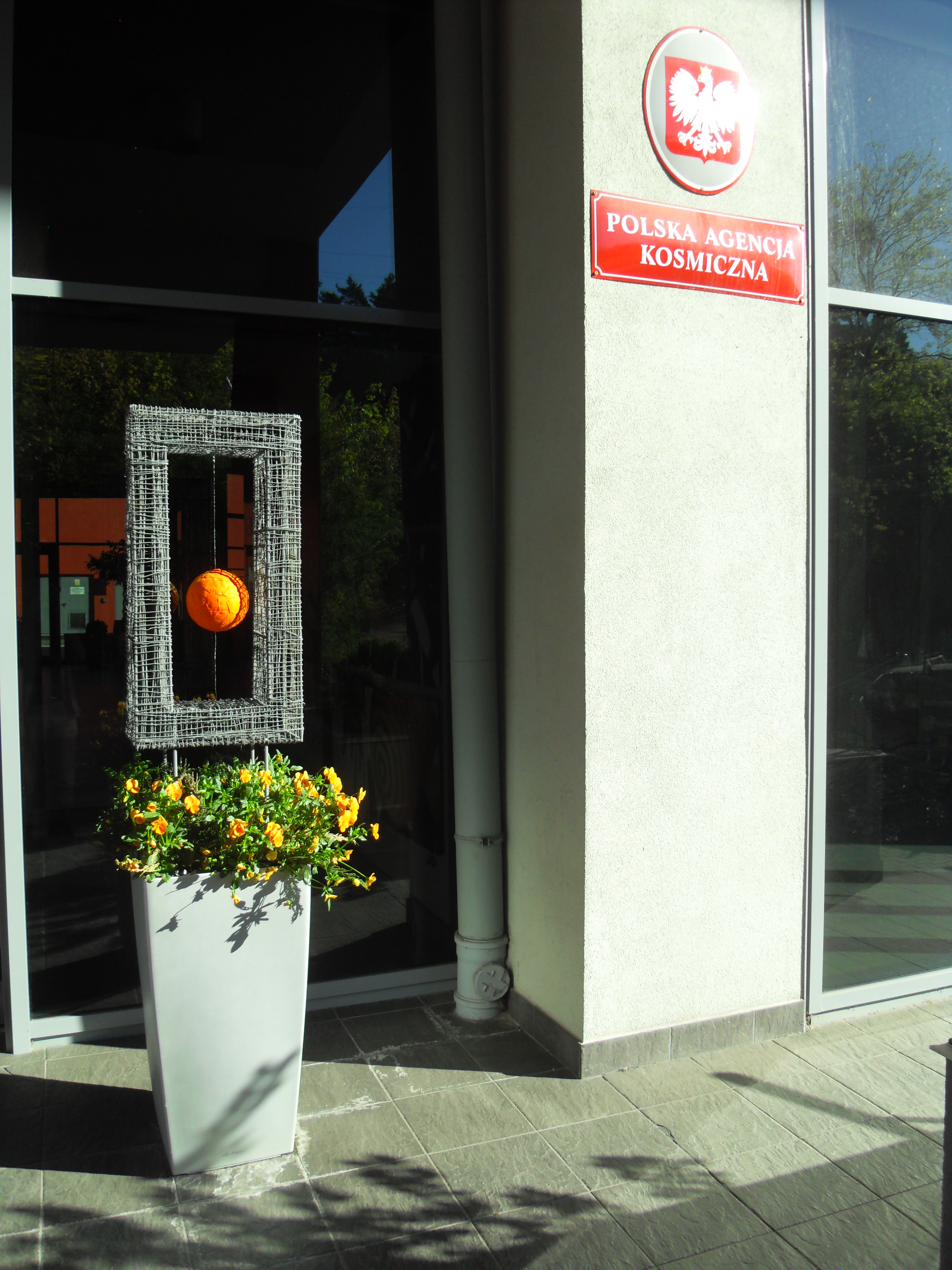 Gdańsk Piecki-Migowo, ul. Trzy Lipy 3 (budynek C), siedziba Polskiej Agencji Kosmicznej.